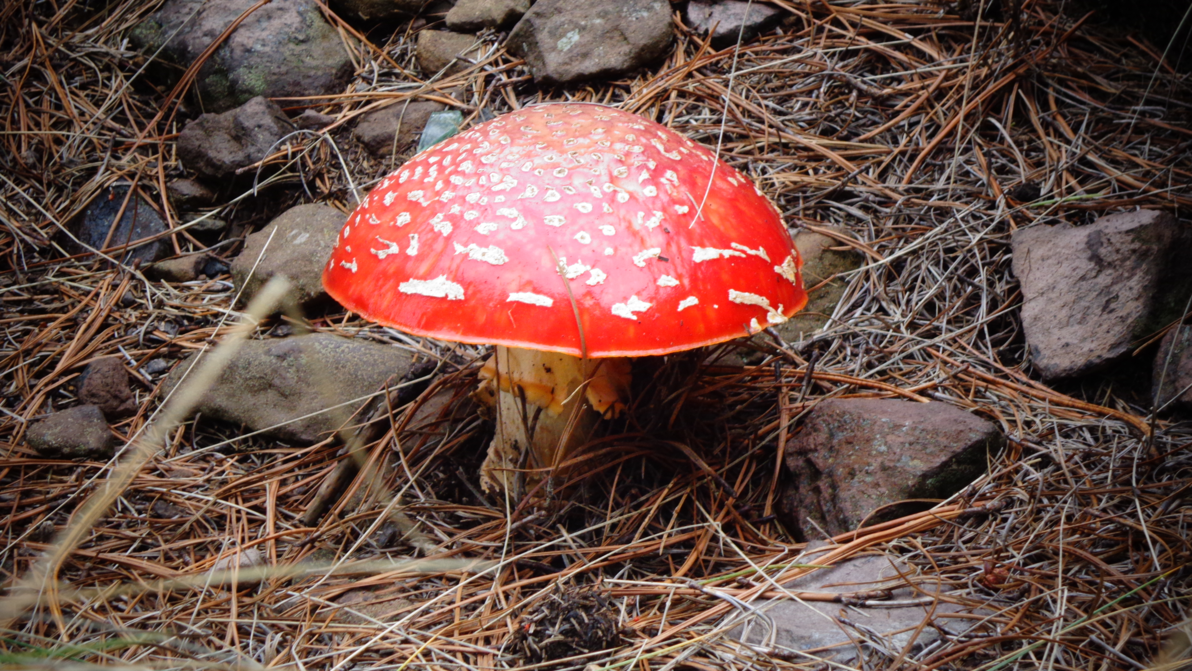 Ajusco Pico del Aguila